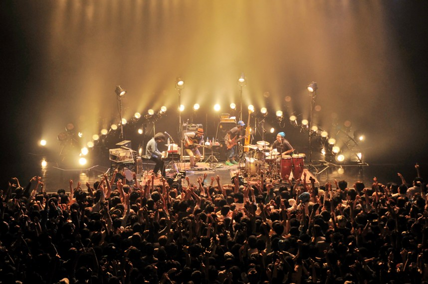 SPECIAL OTHERS